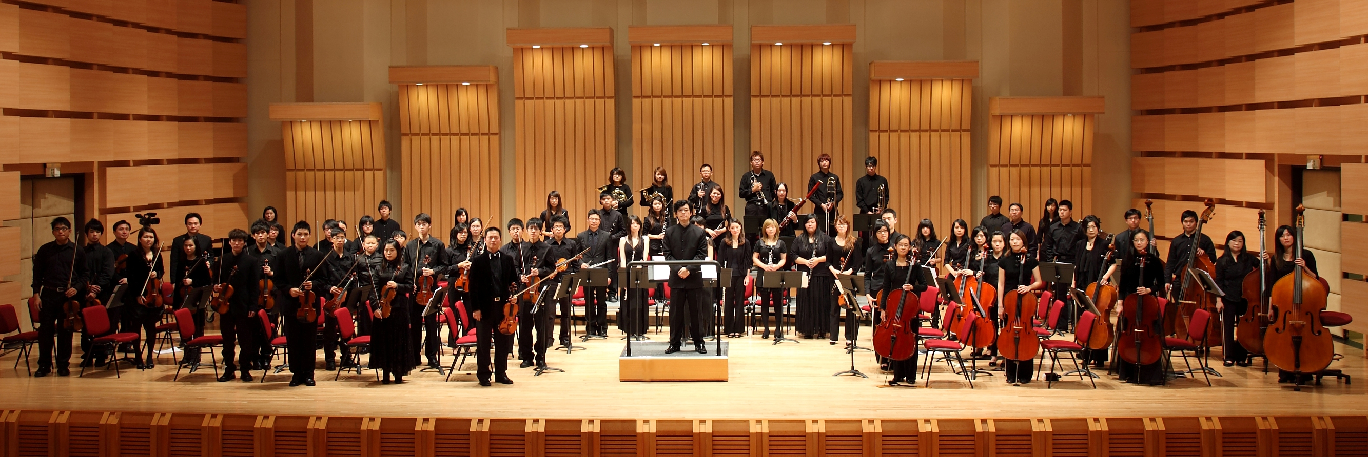 夢響管弦樂團2009年12月公演照 2009/12/20 攝於東吳大學音樂廳 [夢響管弦樂團] GNU自由文檔協議，請見